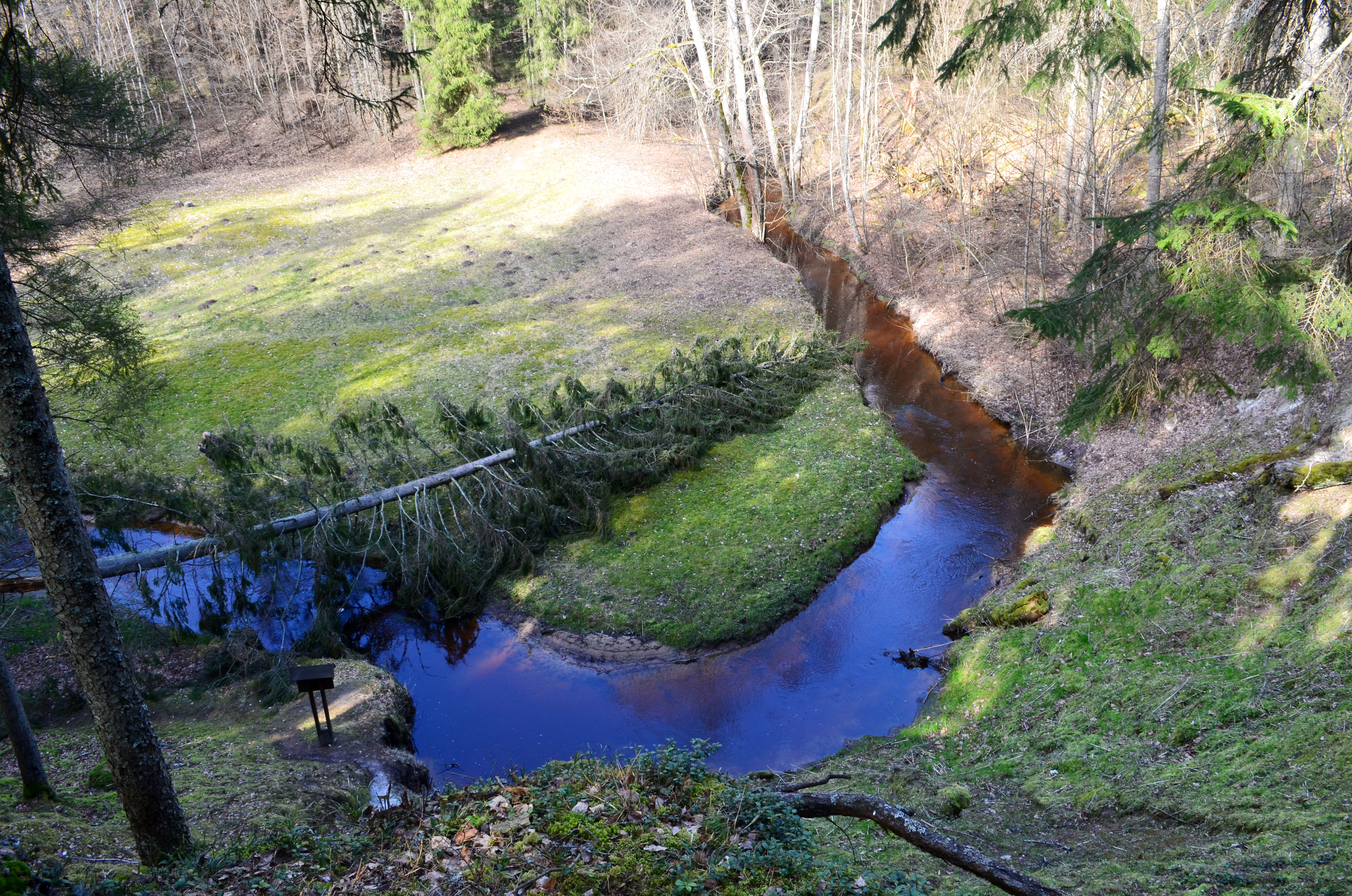 Varius ties atodanga, Anykščių raj.